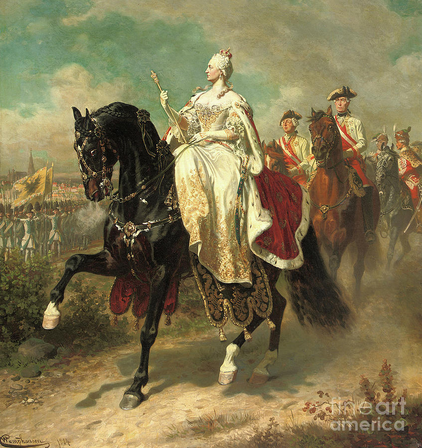 Maria Teresa da Áustria passando revista às tropas austríacas.